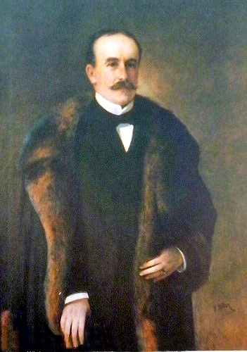 Польський геральдик та генеалог Адам Бонецький.